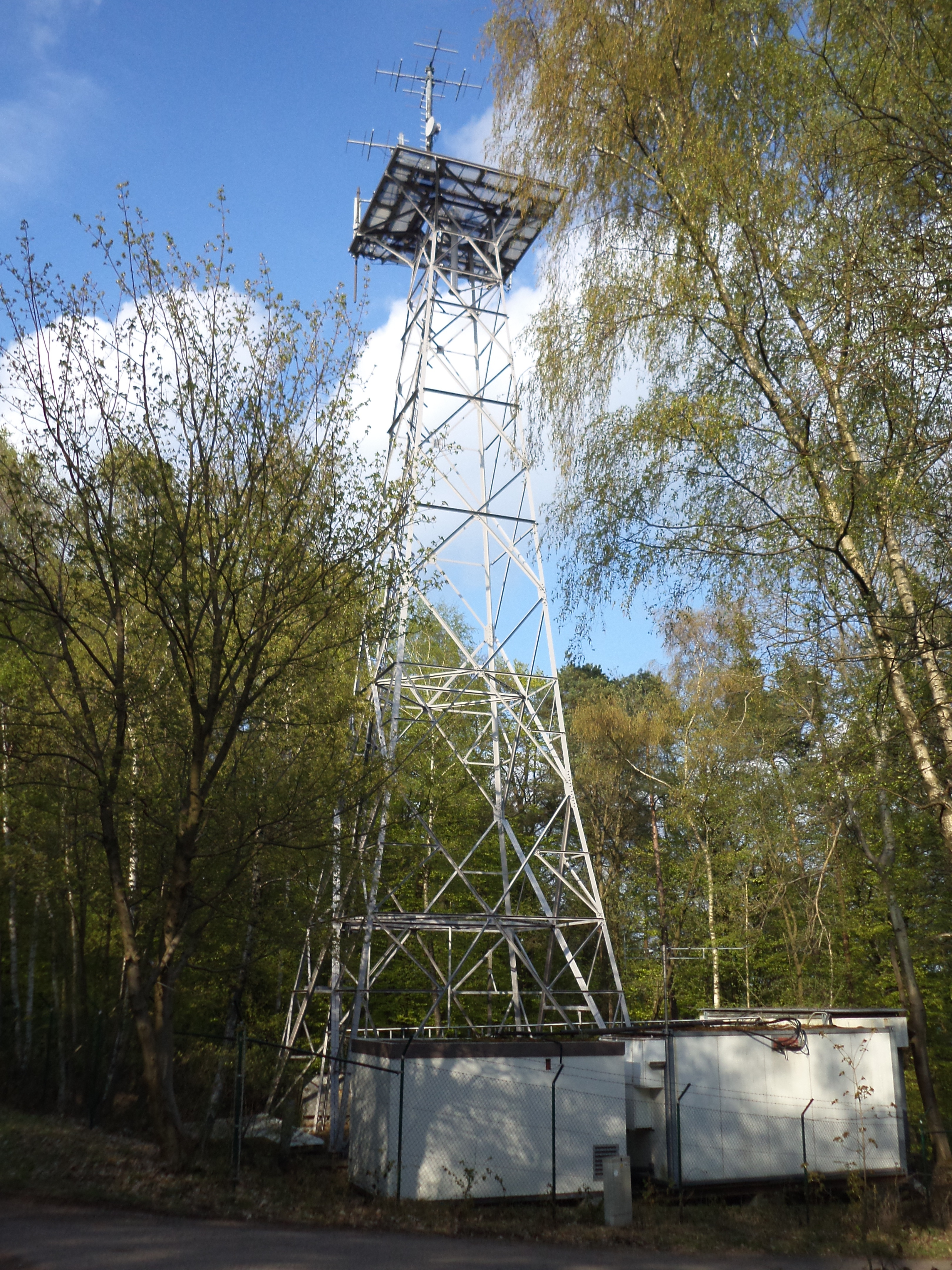 Der Stahlfachwerkturm auf dem Hahnenkamm bei Alzenau